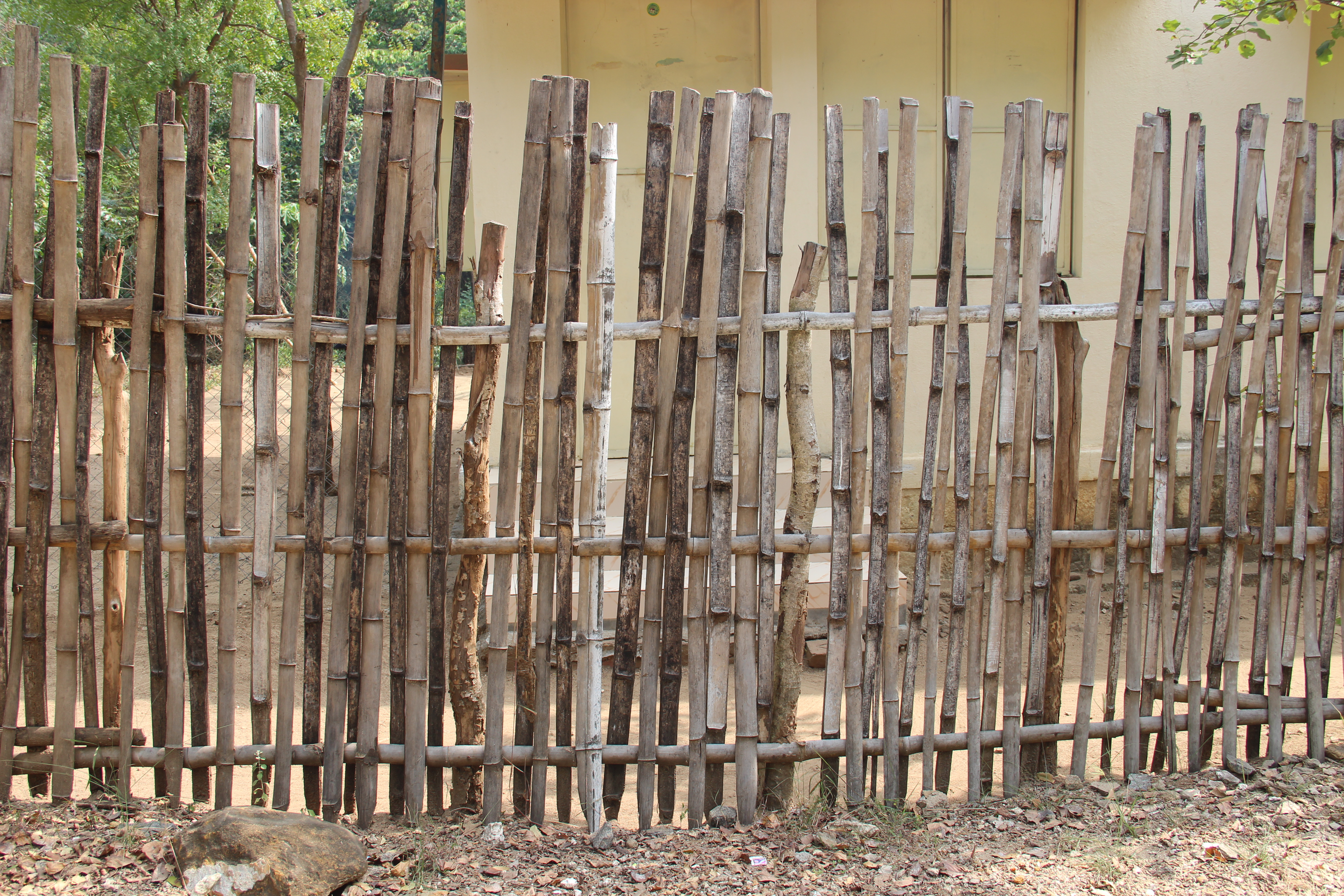 மூங்கில் படல். குரும்பப்பட்டி உயிரியல் பூங்கா, சேலம், தமிழ்நாடு, இந்திய ஒன்றியம்.